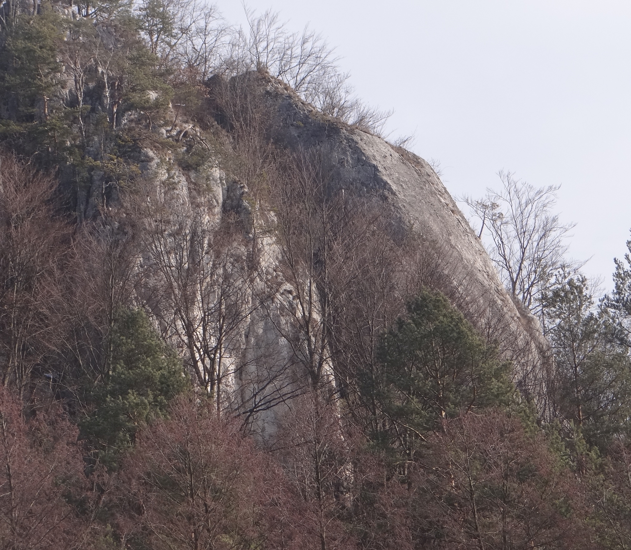 skała Pytajnik (po prawej stronie) w Bramie Będkowskiej